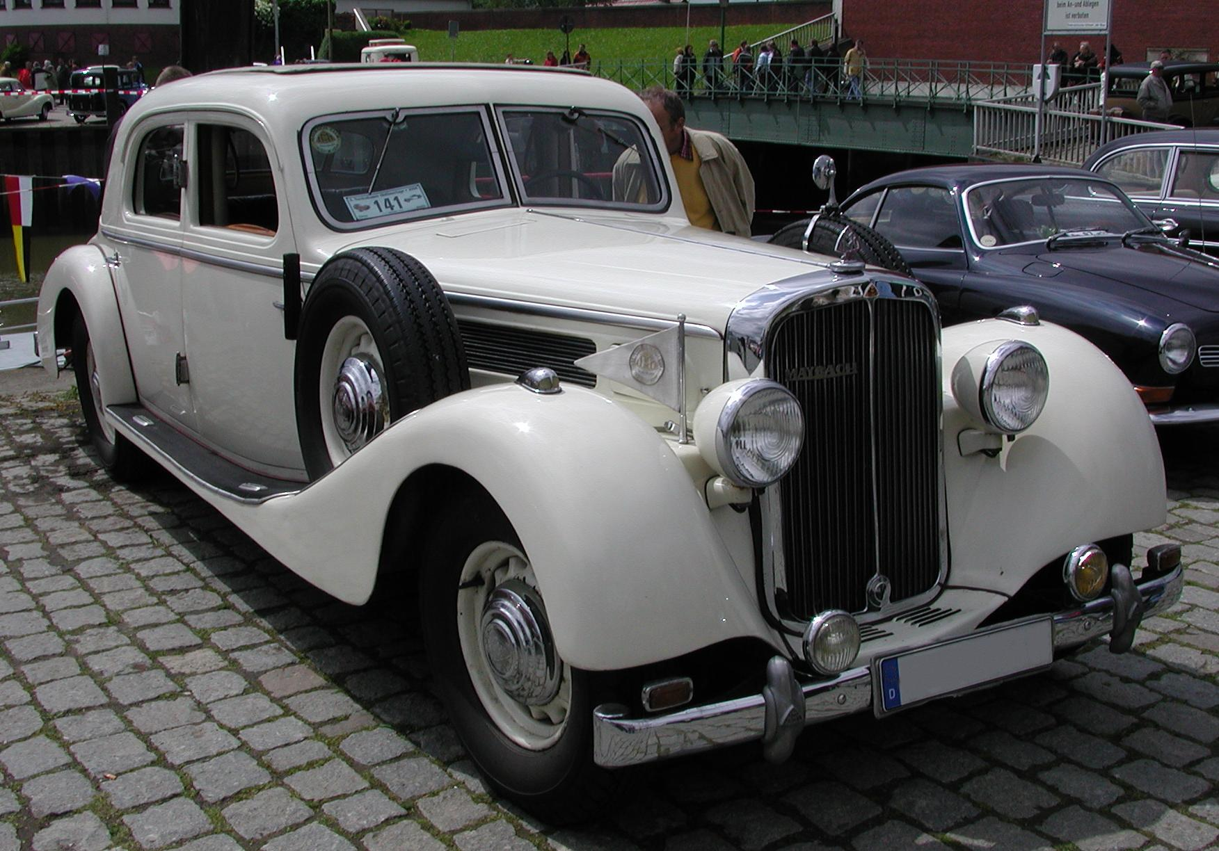 Maybach Limousine Motiv: Maybach SW 42, 1939 - der Wagen hatte sogar schon elektrische Fensterheber und elektrisch verstellbare Sitze